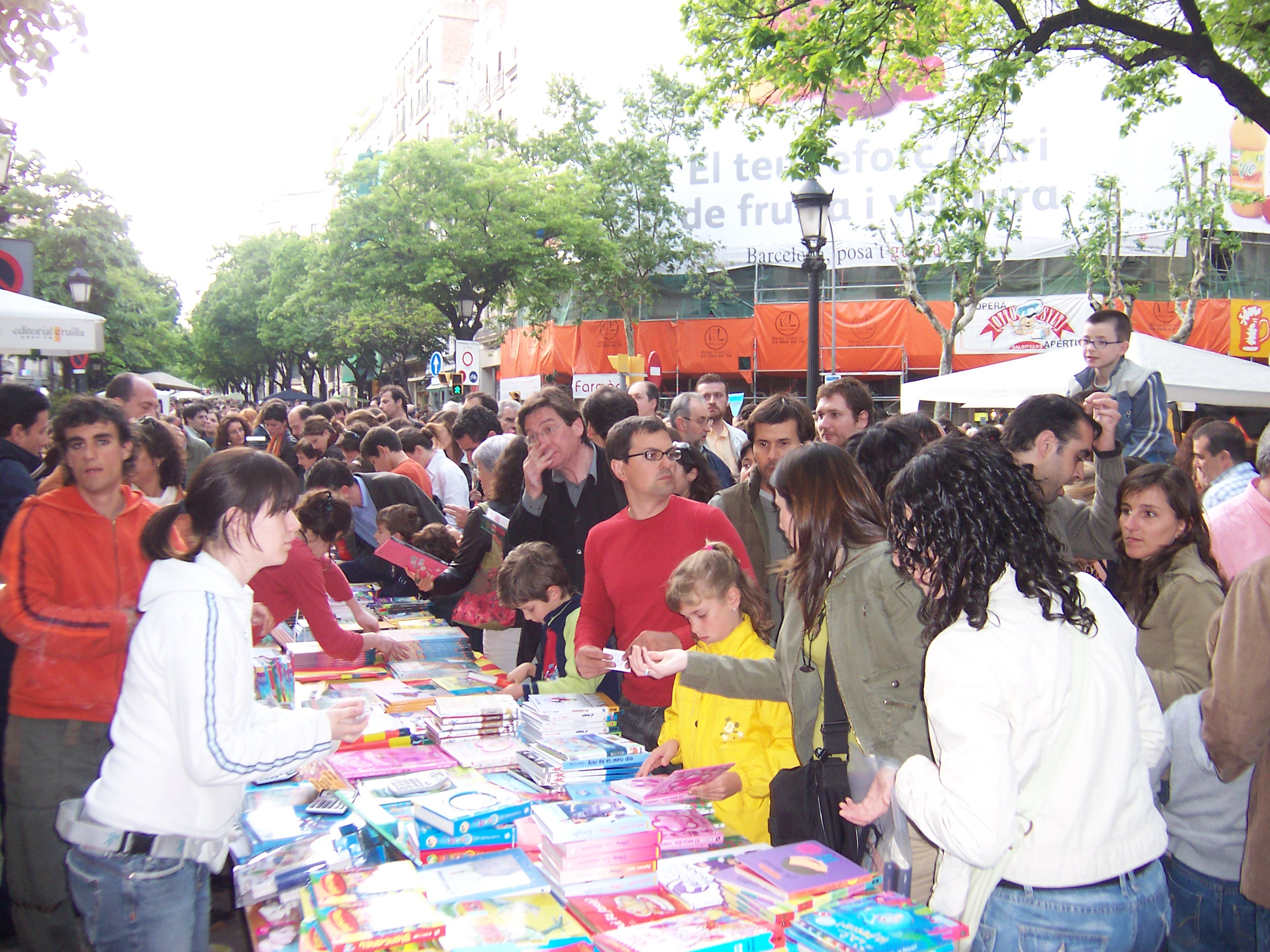 Puesto de venta de libros de la libreria Al·lots El Petit Princep en Barcelona, el Día de Sant Jordi.